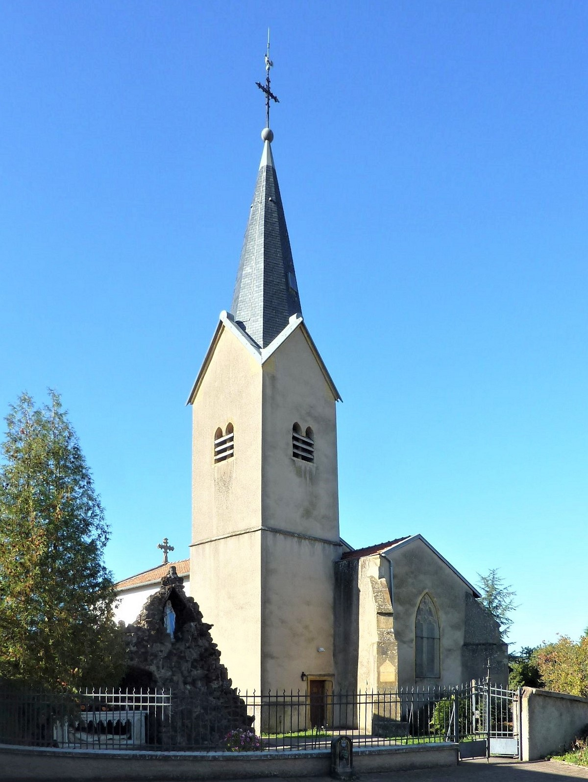 Église Saint-Pierre de Veymerange